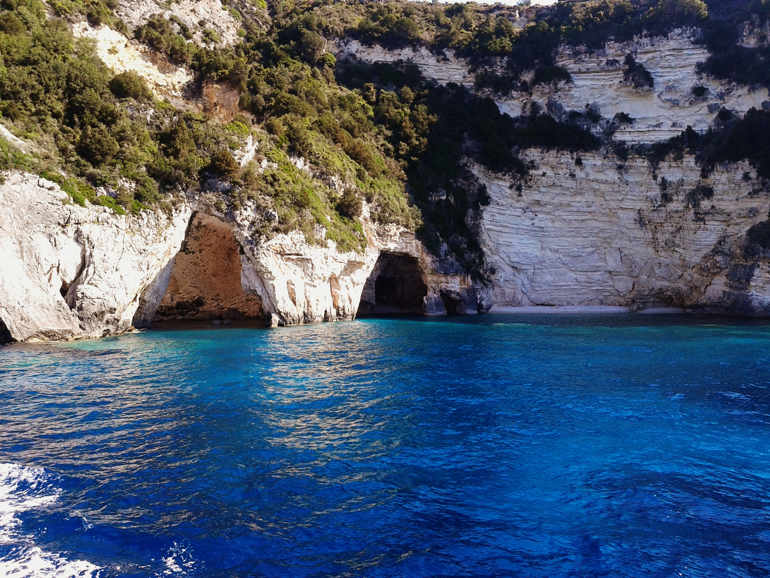 ΣΠΗΛΑΙΟ ΑΝΑΜΕΣΑ ΣΕ ΠΑΞΟΥΣ ΑΝΤΙΠΑΞΟΥΣ This is a photography of Natura 2000 protected area with ID GR2230004